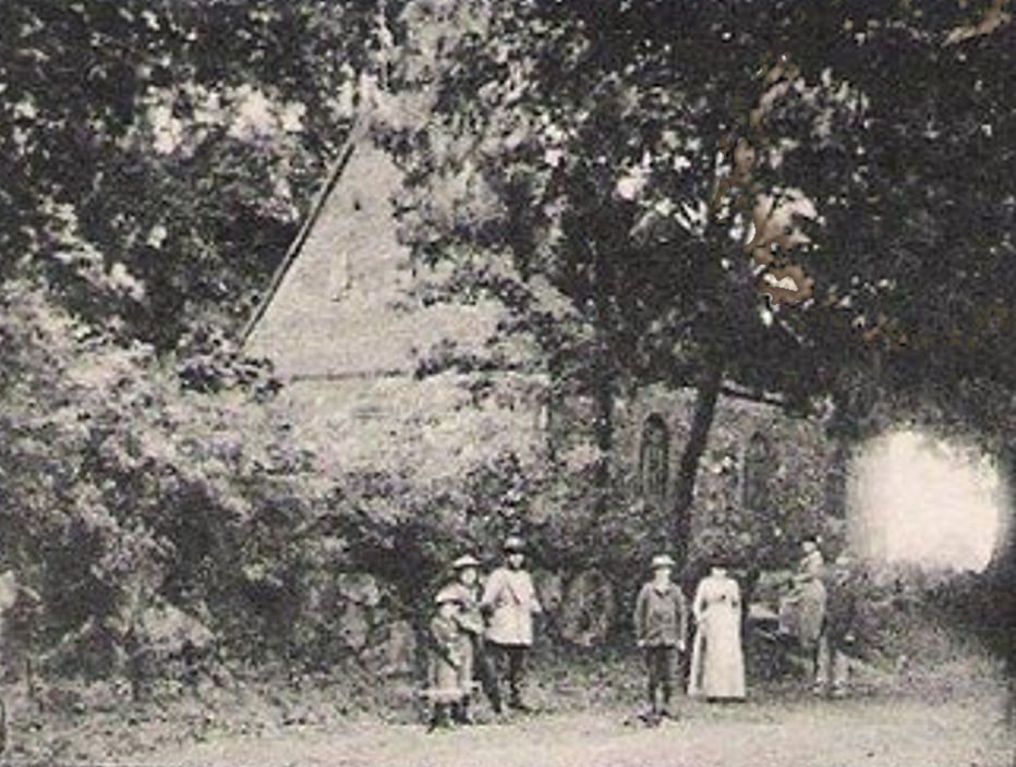 Krukowo